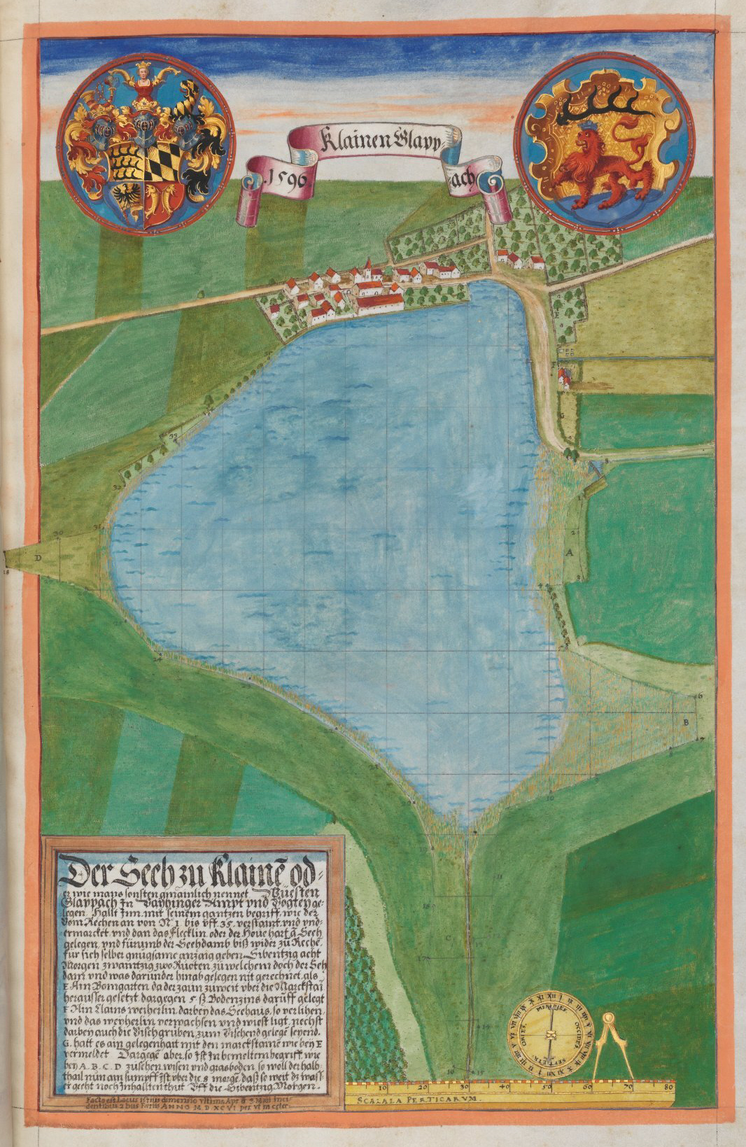 Seehbuch, darinnen alle Seeh und Weyher in dem löplichen Hertzogthumb Würtemberg. Stuttgart (?), Anfang 17. Jh.; Württembergische Landesbibliothek Stuttgart, Cod. hist. fol. 261, fol. 9r, Kleinglattbach